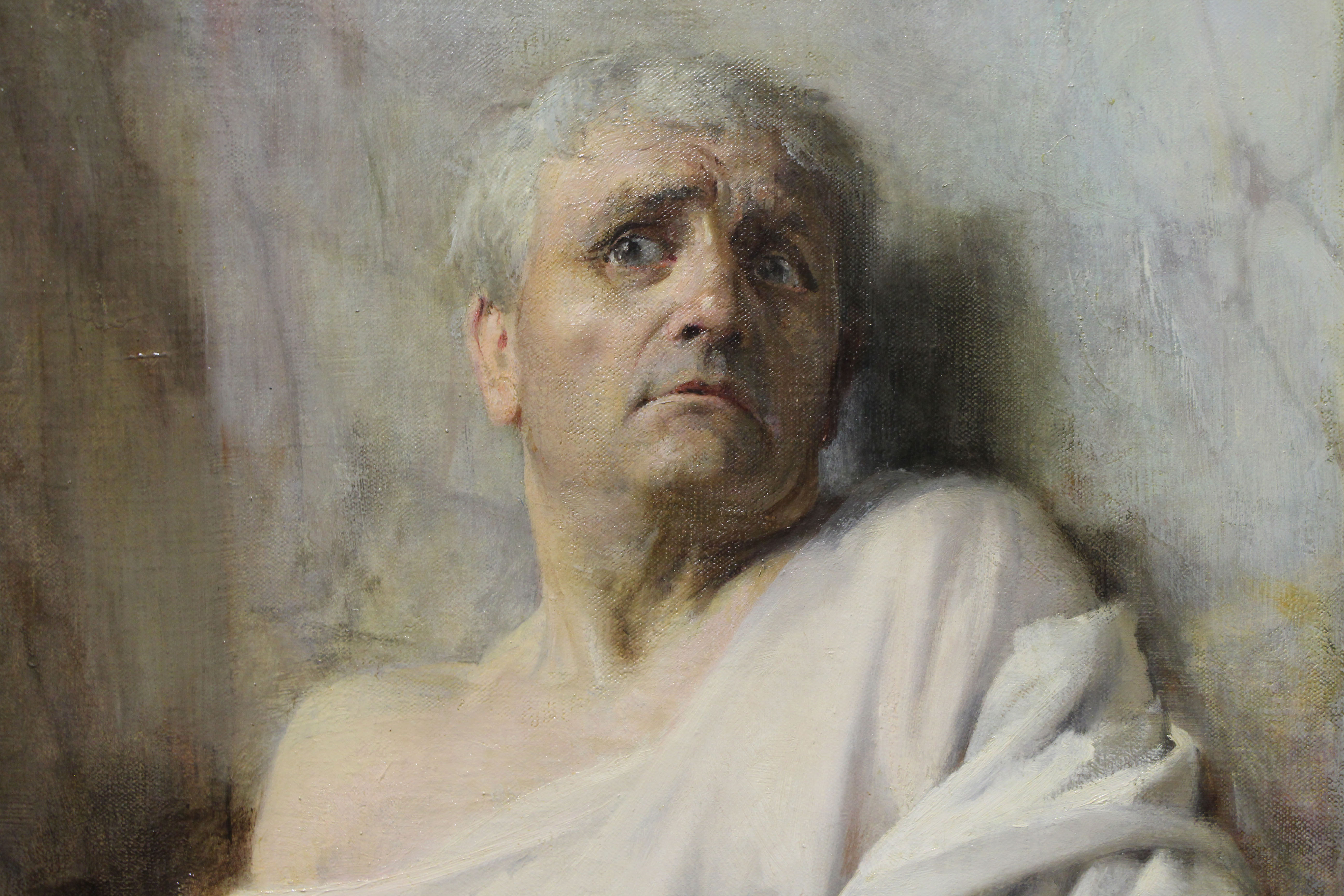 Claude nommé empereur, Charles Lebayle, 1886.